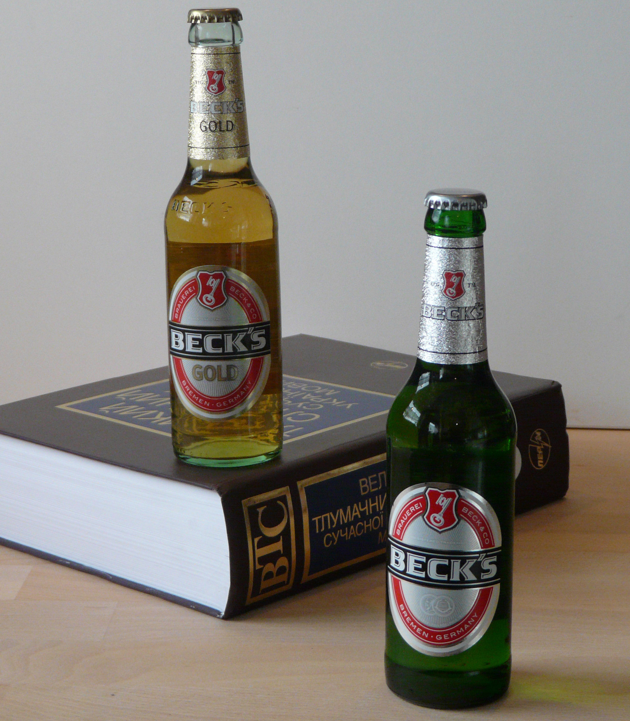 Beck's Klassik & Gold für Ukr-Wiki